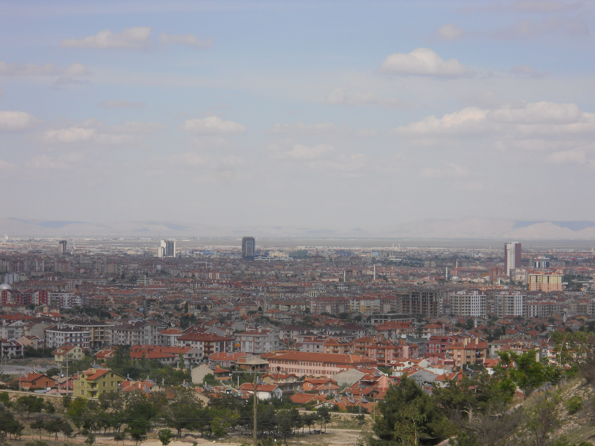 Konya